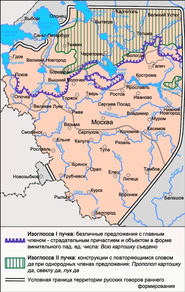 Карта северной диалектной зоны русского языка. Источники: Захарова К. Ф., Орлова В. Г. Диалектное членение русского языка — 2-е изд. — М.: Едиториал УРСС, 2004. — ISBN 5-354-00917-0, с. 86. Бромлей С. В., Булатова Л. Н., Захарова К. Ф. и др. Русская диалектология / Под ред. Л. Л. Касаткина — 2-е изд., перераб. — М.: Просвещение, 1989. — ISBN 5-09-000870-1, с. 205